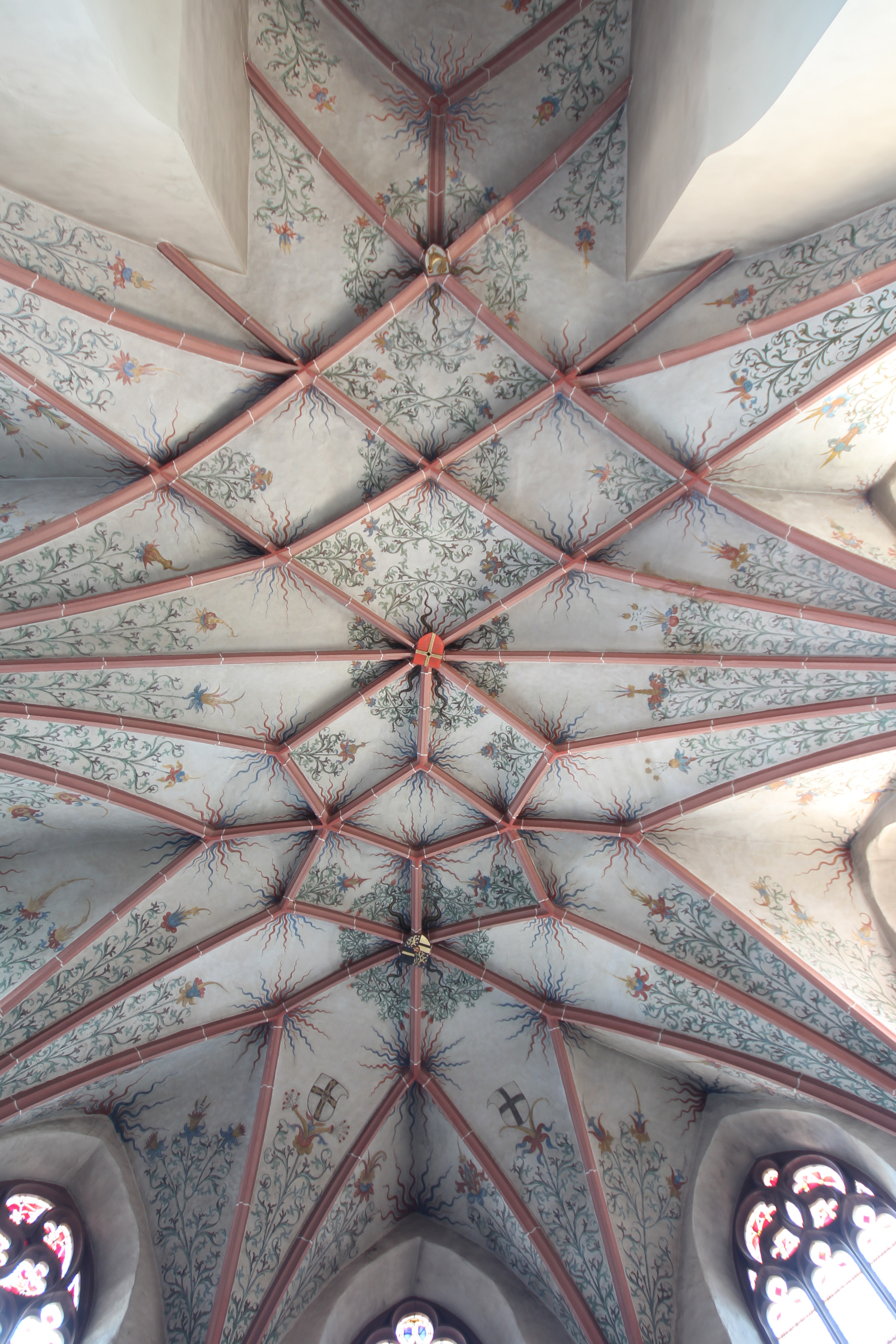 Decke im Chor der Evangelischen Stadtkirche zu Herborn